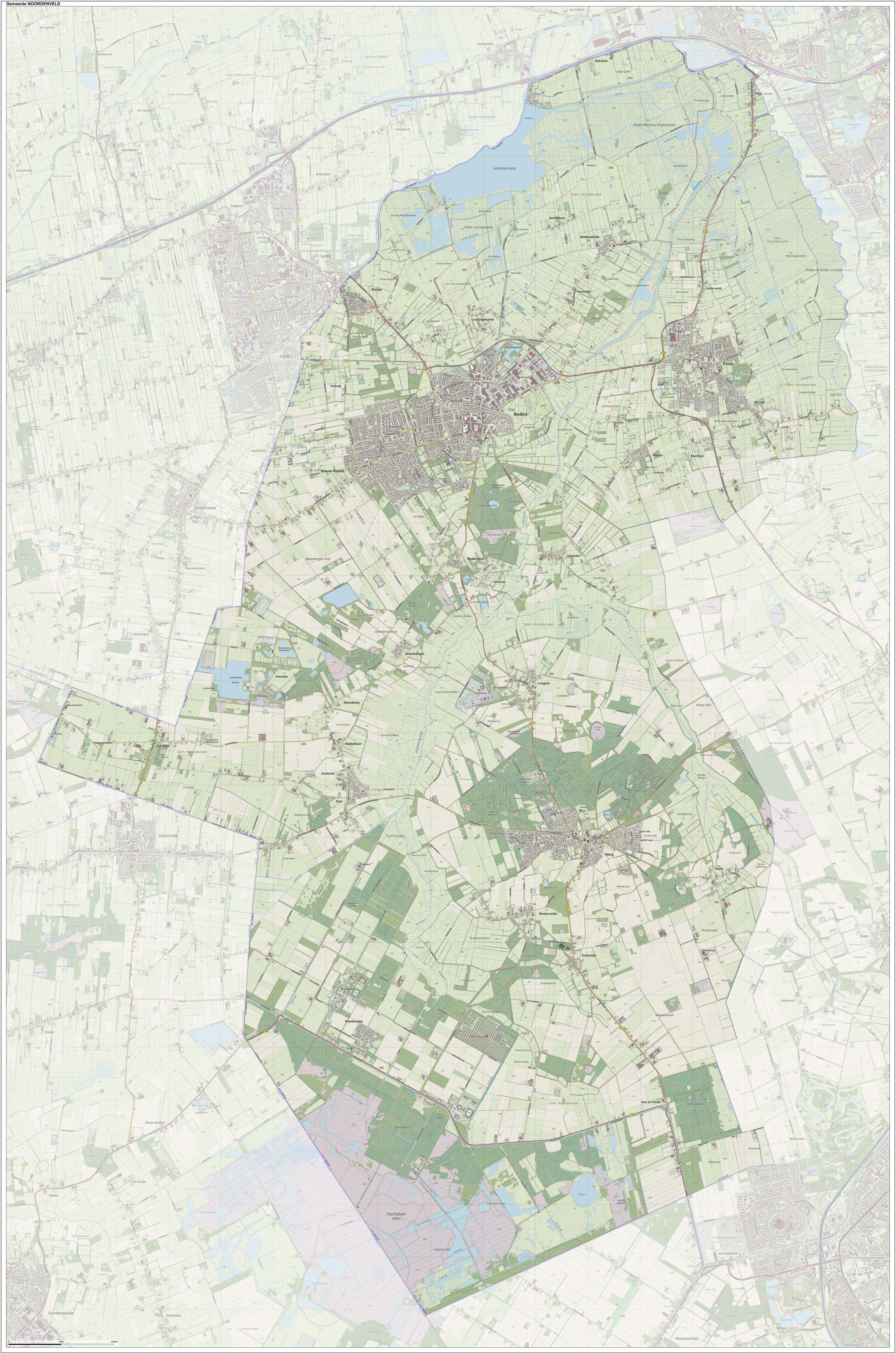 Topografische gemeentekaart. Resolutie: 400 pixels/km. Kaartbeeld samengesteld uit de open geodata van de Top10NL en Top25namen (Kadaster), Creative Commons-BY licentie. Gebouwvlakken uit open geodata BAG extract. Wegen uit de OpenStreetMap, OpenStreetMap community. Reliëfschaduw uit de Actuele Hoogtekaart AHN2. Samenstelling en kleurenschema: Jan-Willem van Aalst, met QGIS. Zie ook de Legenda.